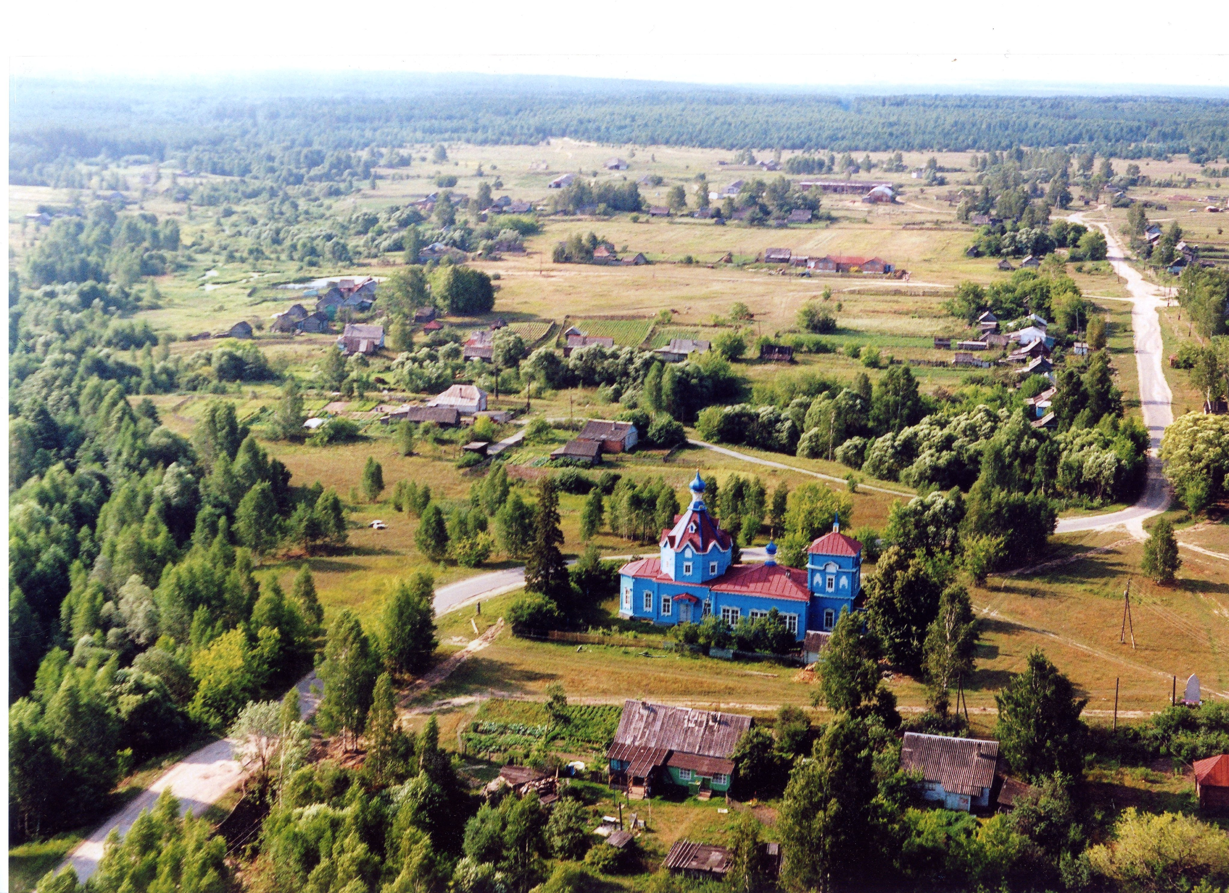 Богородицкая церковь: Боровое, Шиловский район, Рязанская область